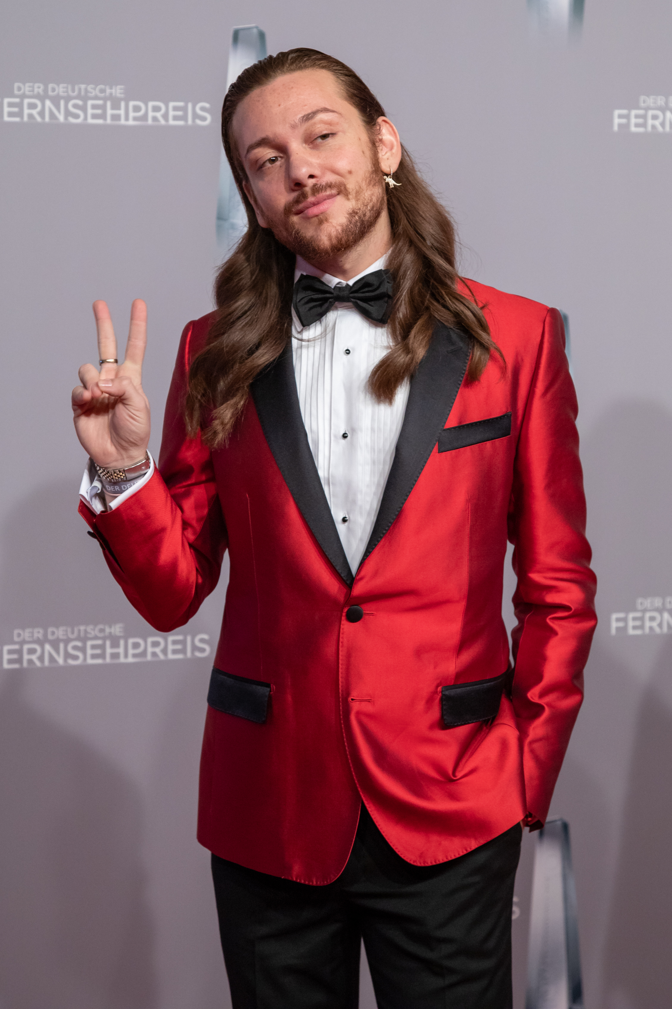 Riccardo Simonetti beim Deutschen Fernsehpreis 2019 in der Düsseldorfer Rheinterrasse